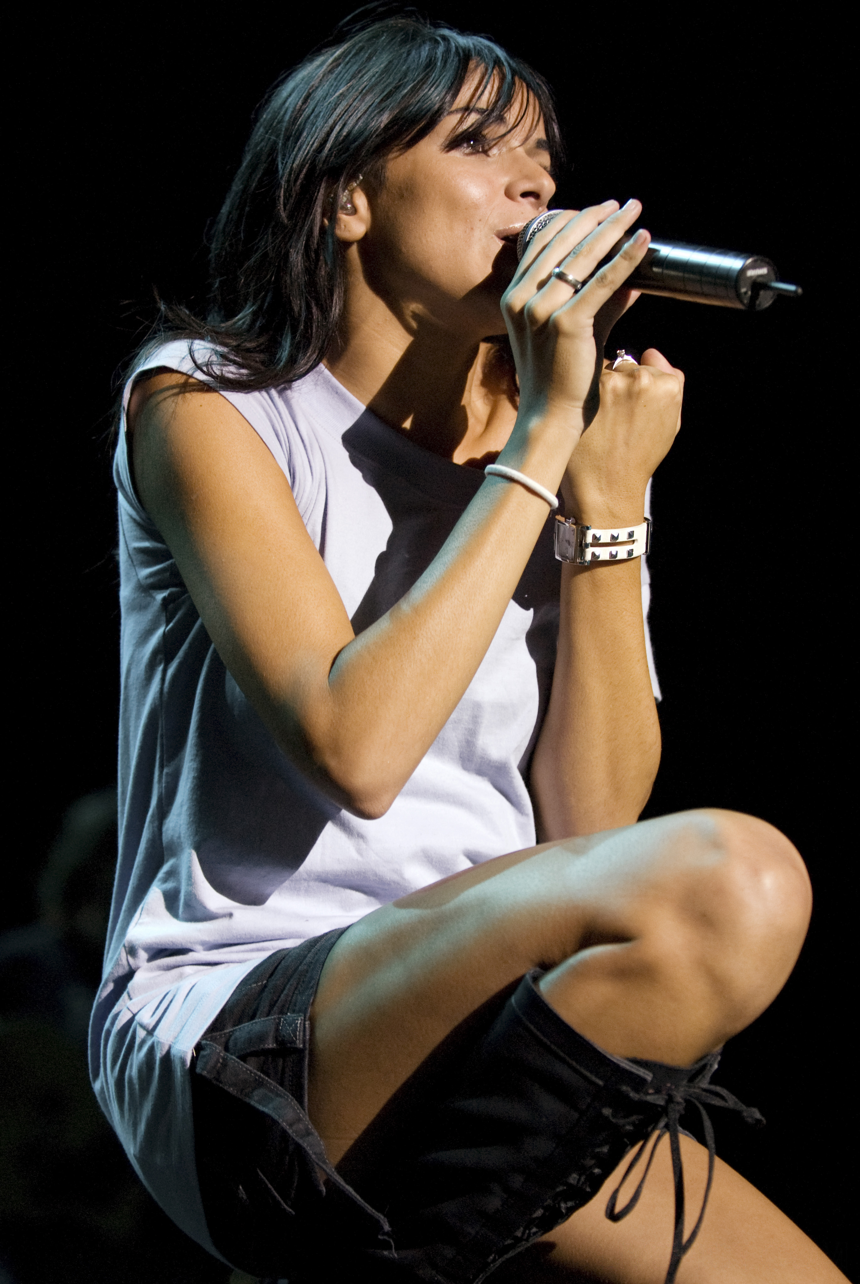 El Sueño de Morfeo